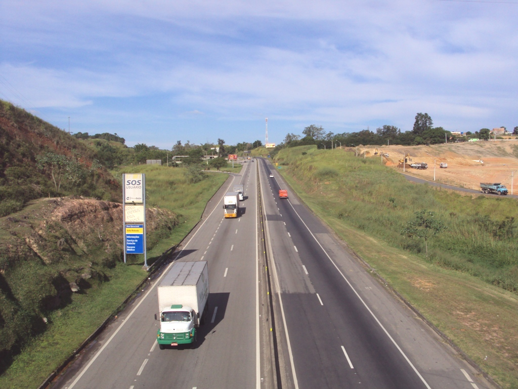 Rodovia Presidente Dutra (BR-116), altura do município de Volta Redonda (RJ)